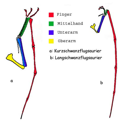 Flugsaurierflügel im Vergleich